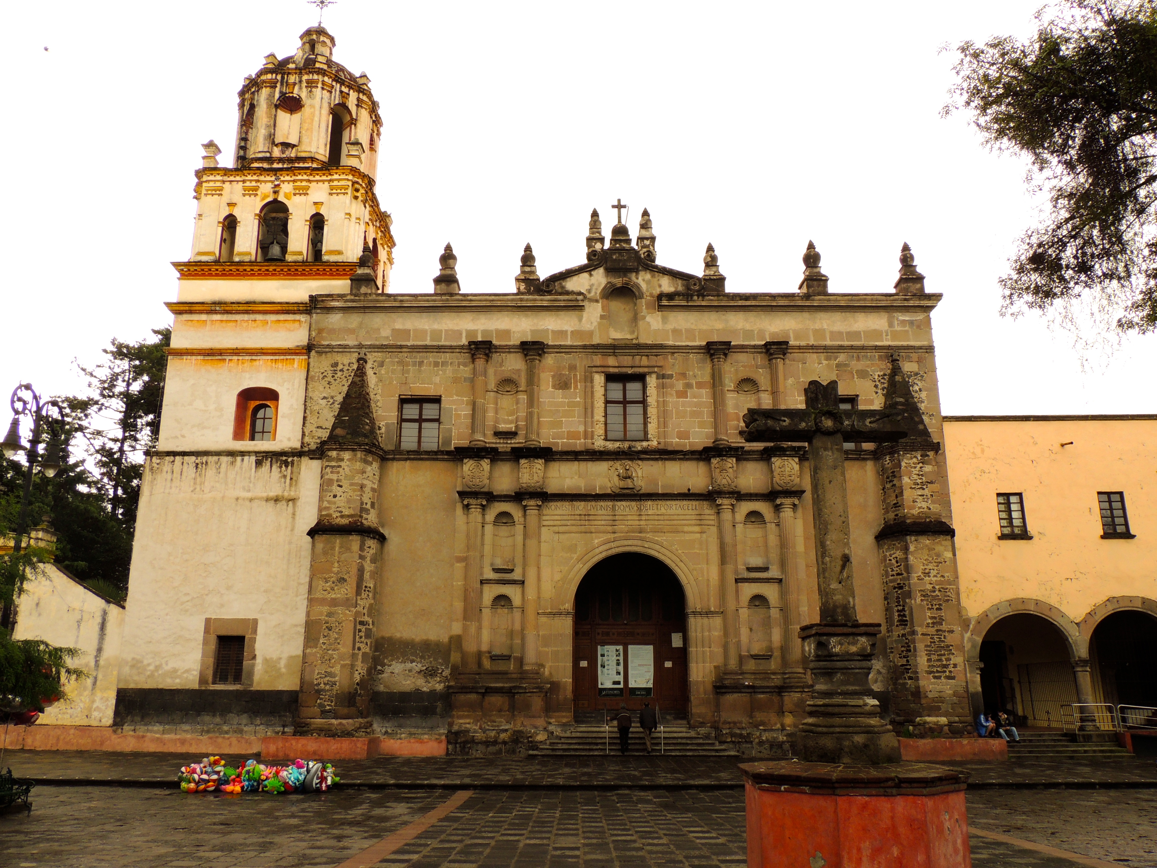 Iglesia de San Juan Bautista (Coyoacán)